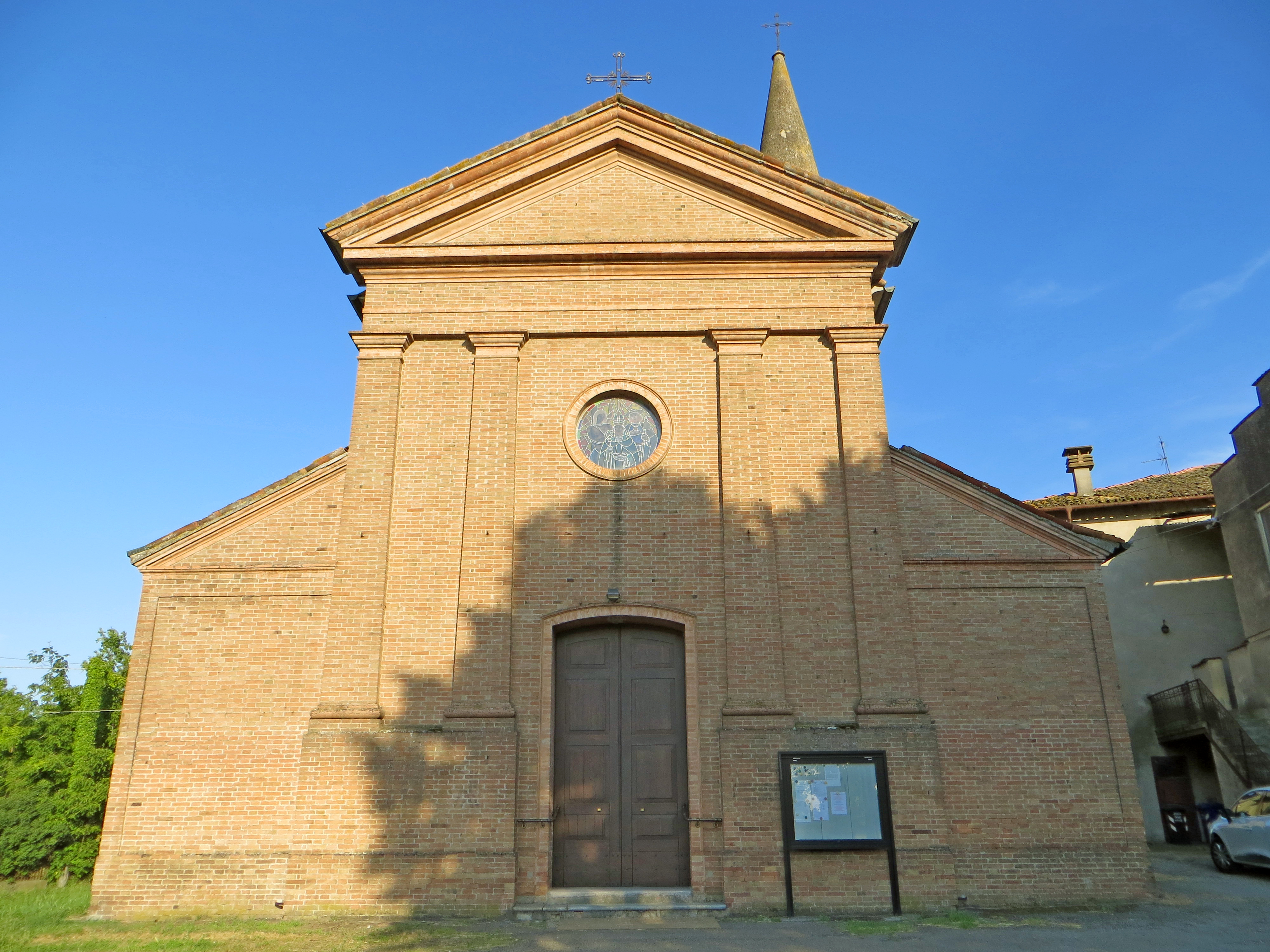 Chiesa di San Vigilio vescovo e martire (Samboseto, Busseto) - facciata